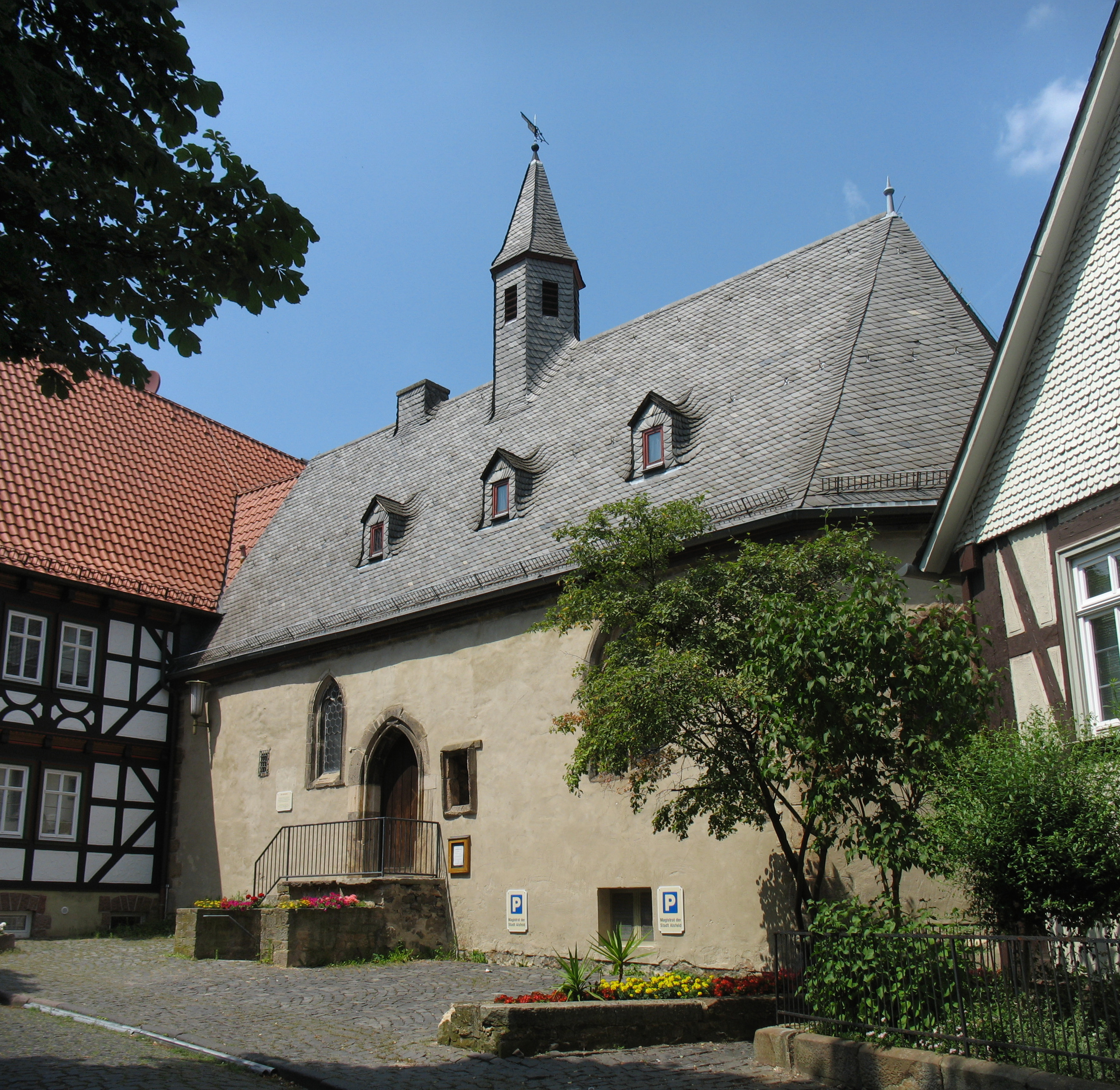 Beinhaus in Alsfeld. Heute Stadtarchiv.